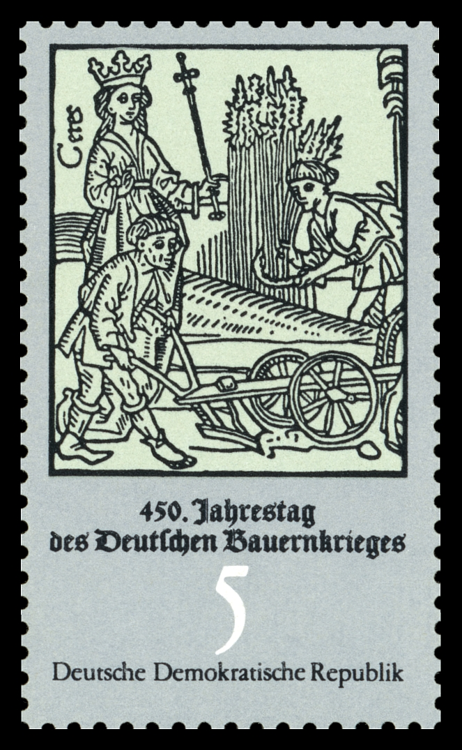 Information: 450. Jahrestag des Deutschen Bauernkrieges: Bauern bei der Fronarbeit Ausgabepreis: 5 Pfennig First Day of Issue / Erstausgabetag: 11. Februar 1975 Auflage: 2.000.000 Entwurf: Müller Druckverfahren: Offsetdruck Michel-Katalog-Nr: Ländercode-MiNr: 2013